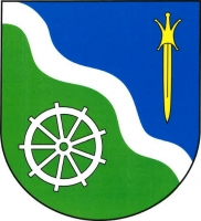 Bystřice (JC), znak. Modro-zeleně kosmým stříbrným vlnitým břevnem dělený štít. Nahoře postavený zlatý keltský meč, dole stříbrné mlýnské kolo s devíti lopatkami.